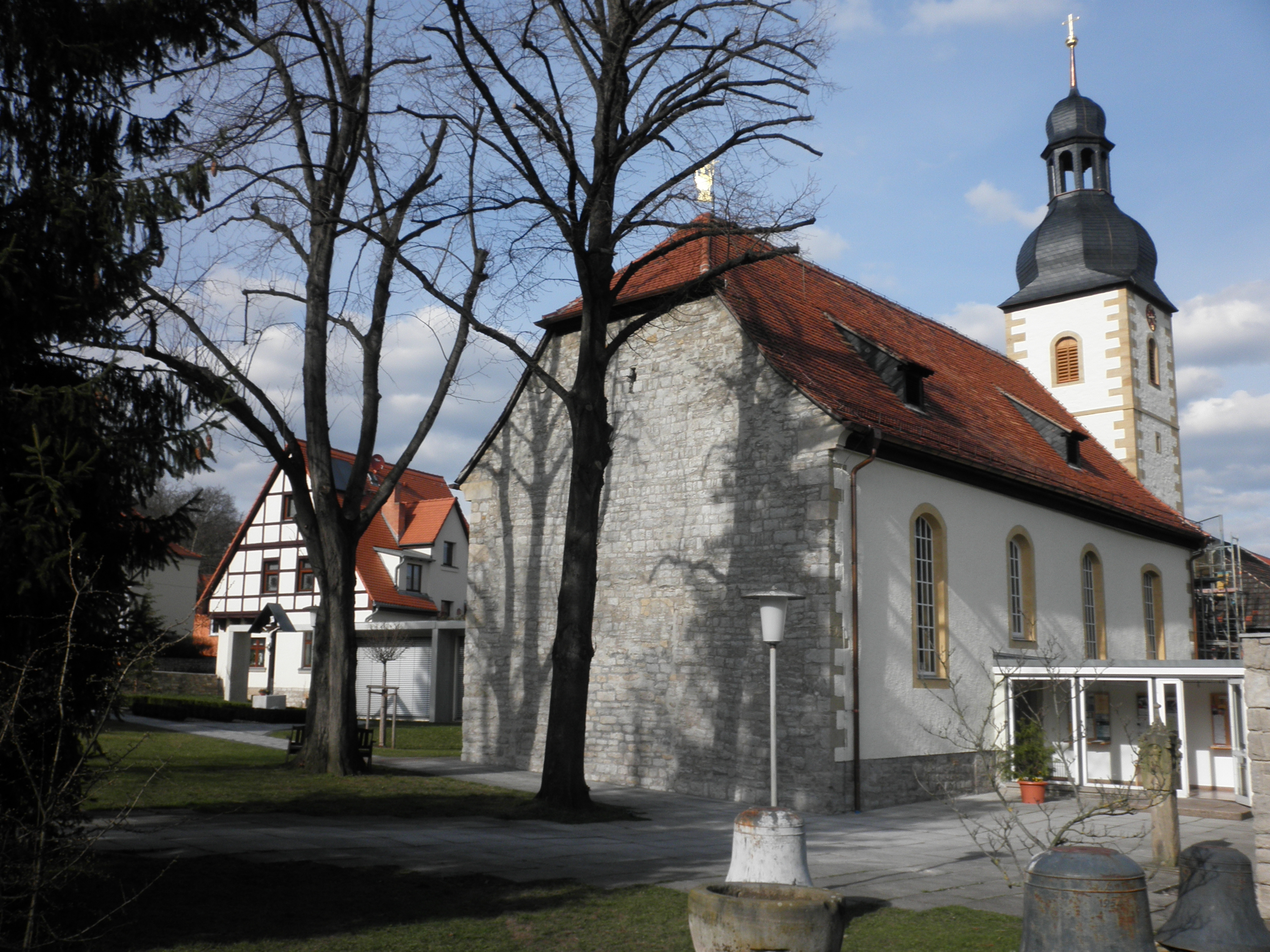 Kathol. Kirche Hochheim